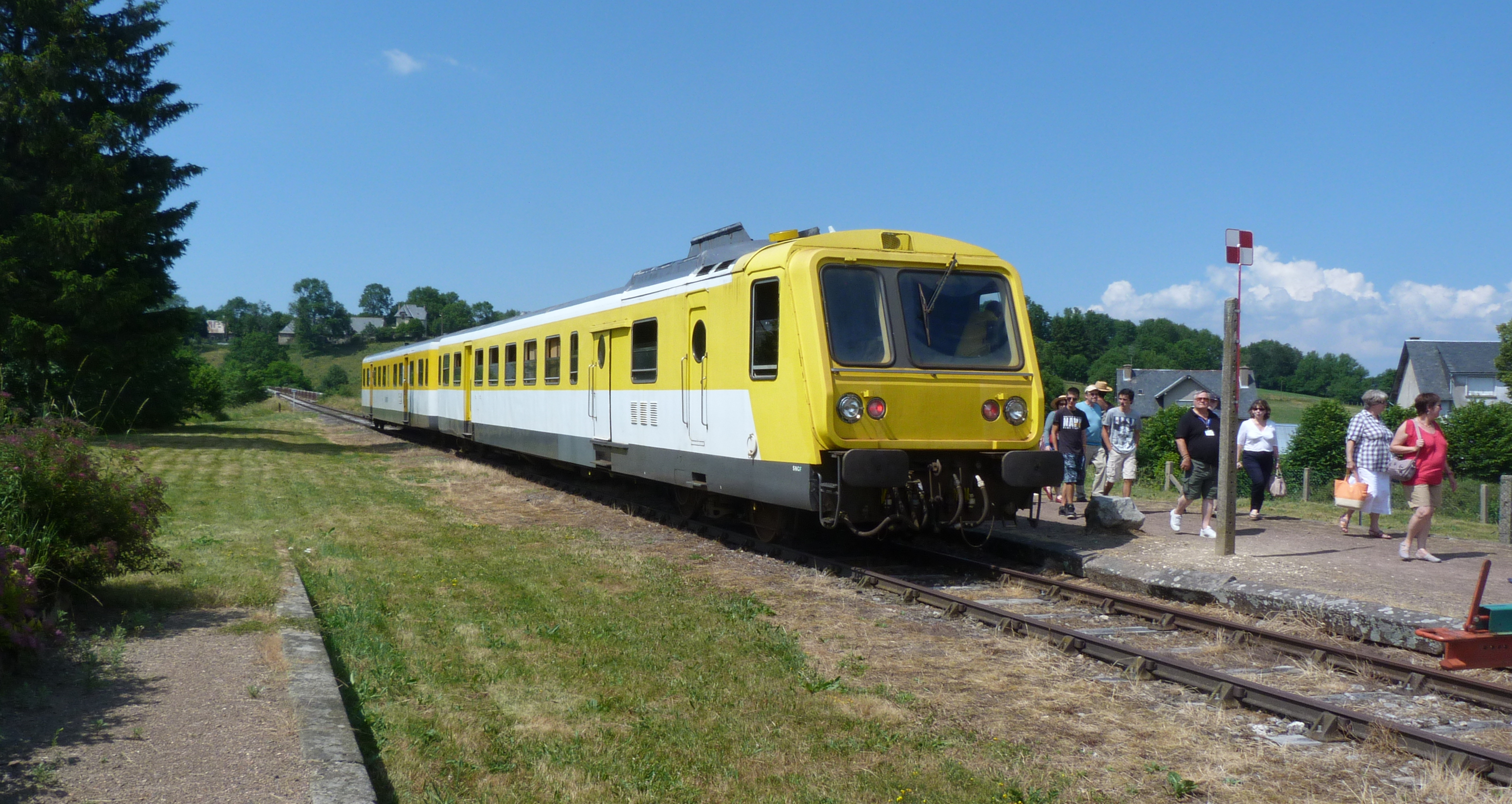 Rame X 2770 en gare de Riom-es-Montagnes